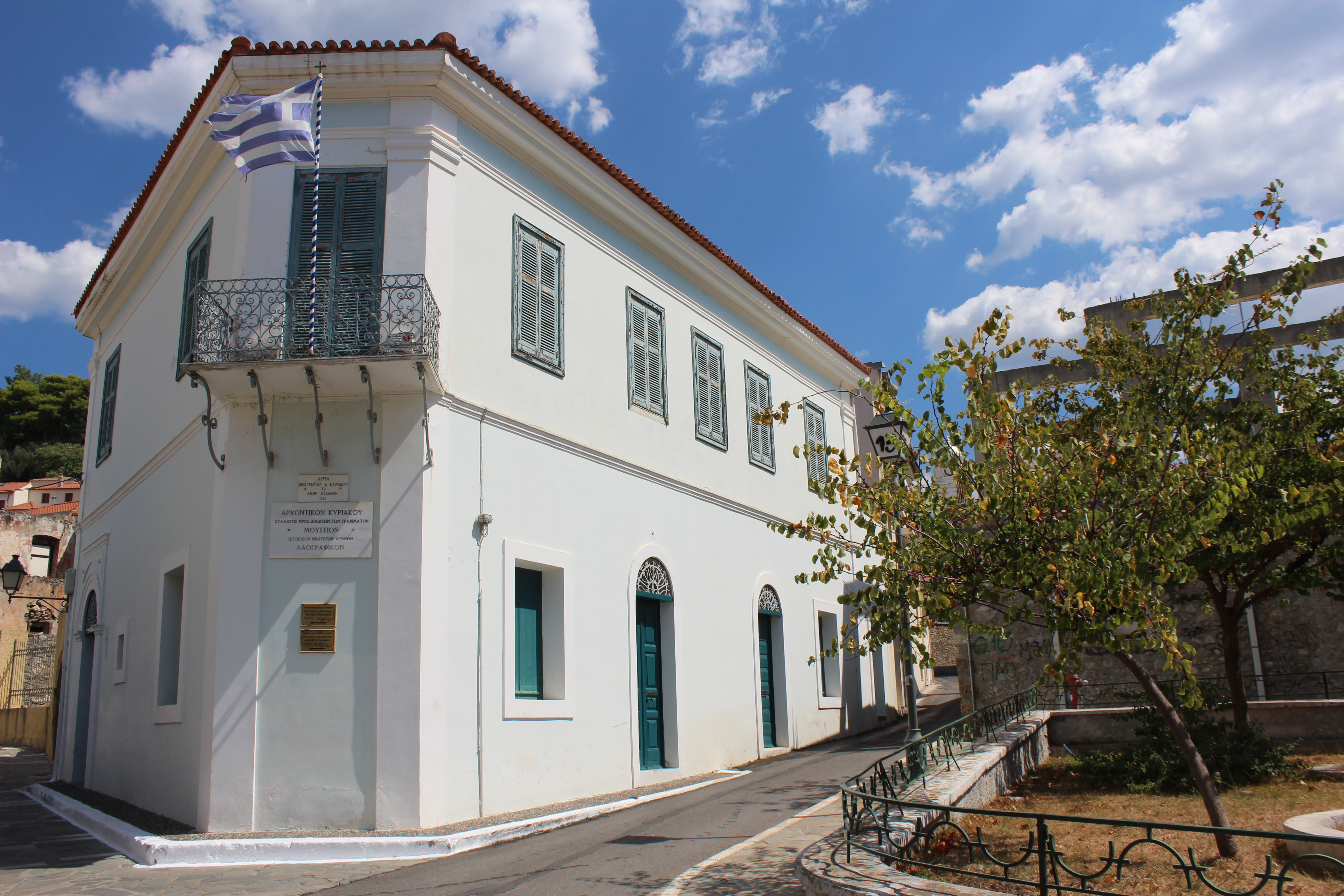 Λαογραφικό Μουσείο Καλαμάτας - Αρχοντικό Κυριακού«Λαογραφικό Μουσείο Καλαμάτας - Αρχοντικό Κυριακού»